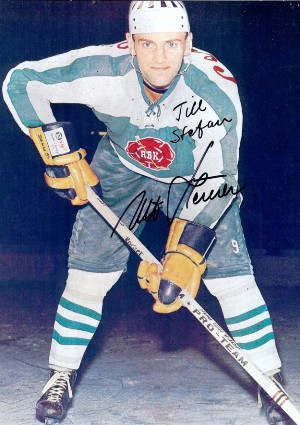 Ulf Sterner playing for Rögle BK